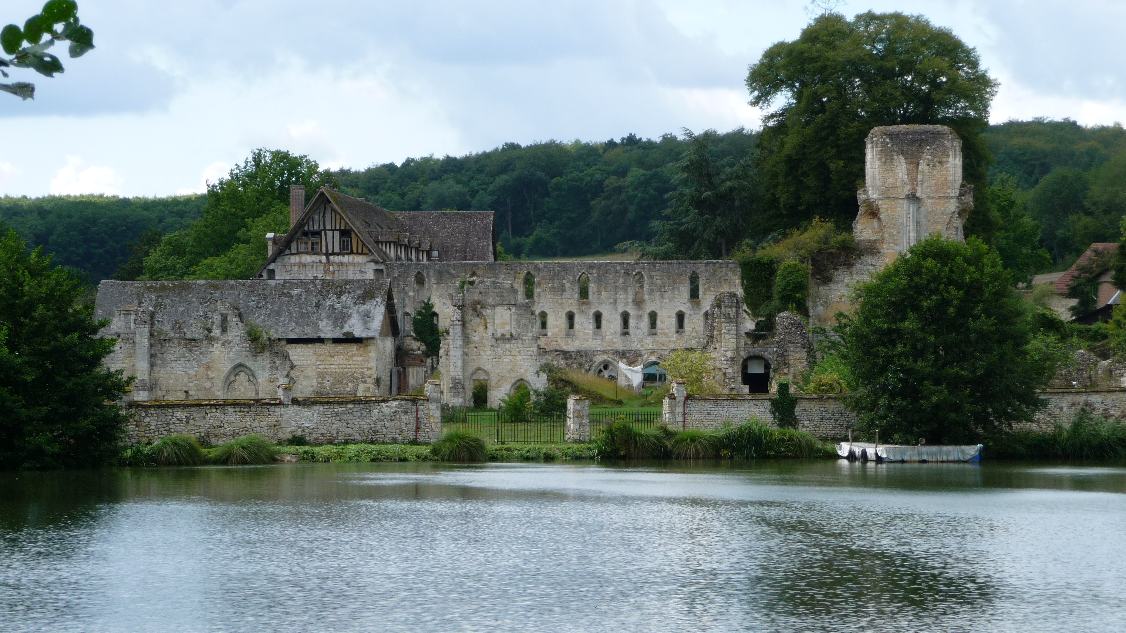 Klosterruine Mortemer von Osten